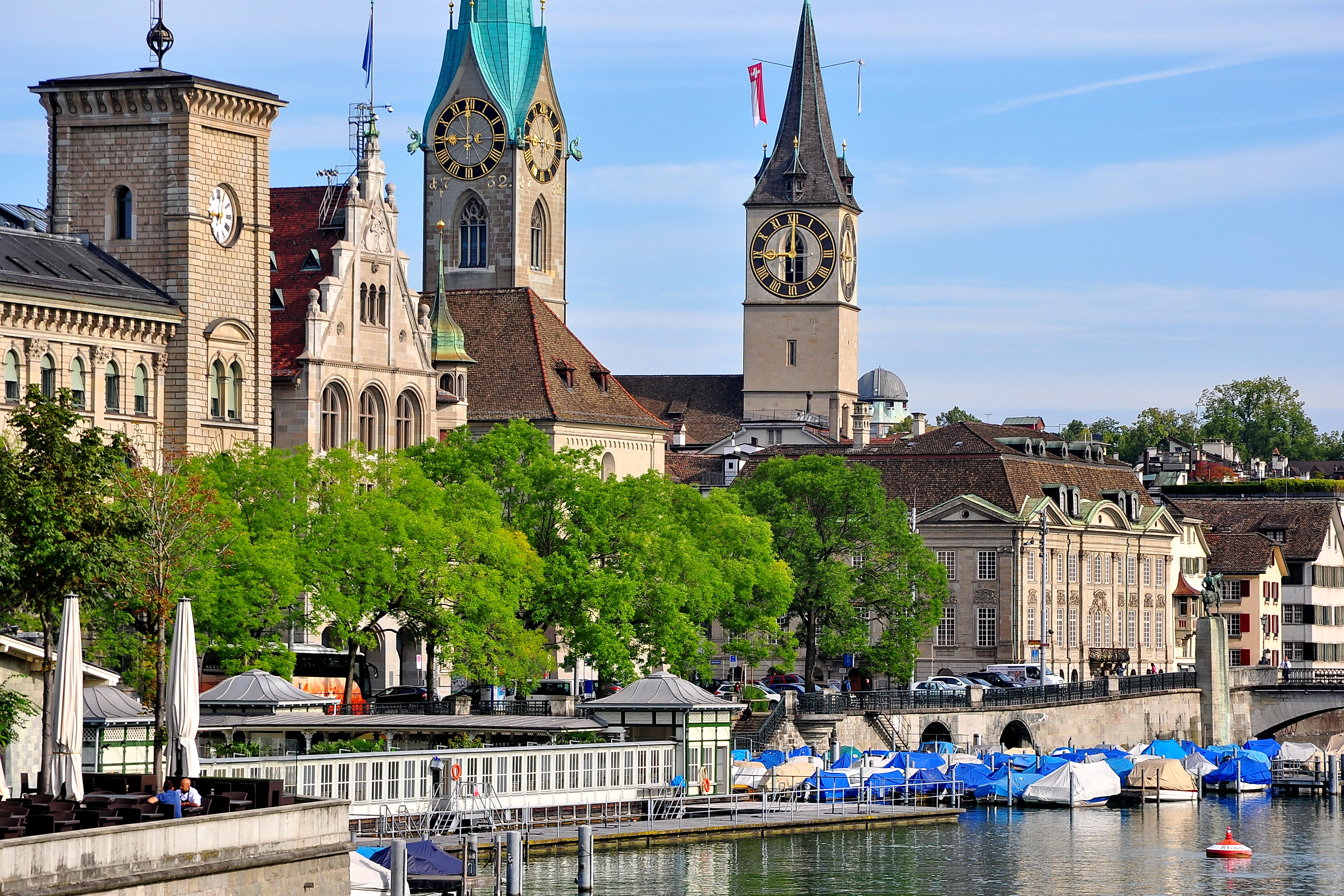 View from Quaibrücke (Quai bridge) in Zürich (Switzerland) towards Zürichsee : Bauschänzli and Frauenbadi [lido for women]; in the Limmat river, Stadthausquai and Fraumünsterpost, Stadthaus Zürich [city government], Münsterhof square, Fraumünster and St. Peter church towers, Zunfthaus zur Meisen (fayence museum), Lindenhof hill in the background and Münsterbrücke to the right.